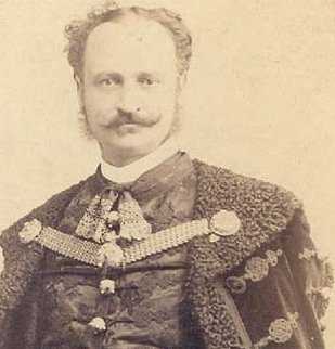 Wlassics Gyula (1852 - 1937) jogász, miniszter